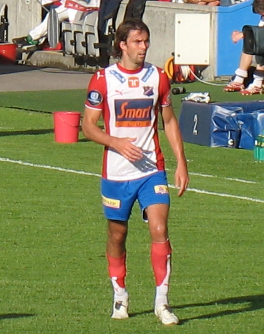 Fotballspilleren Jo Tessem